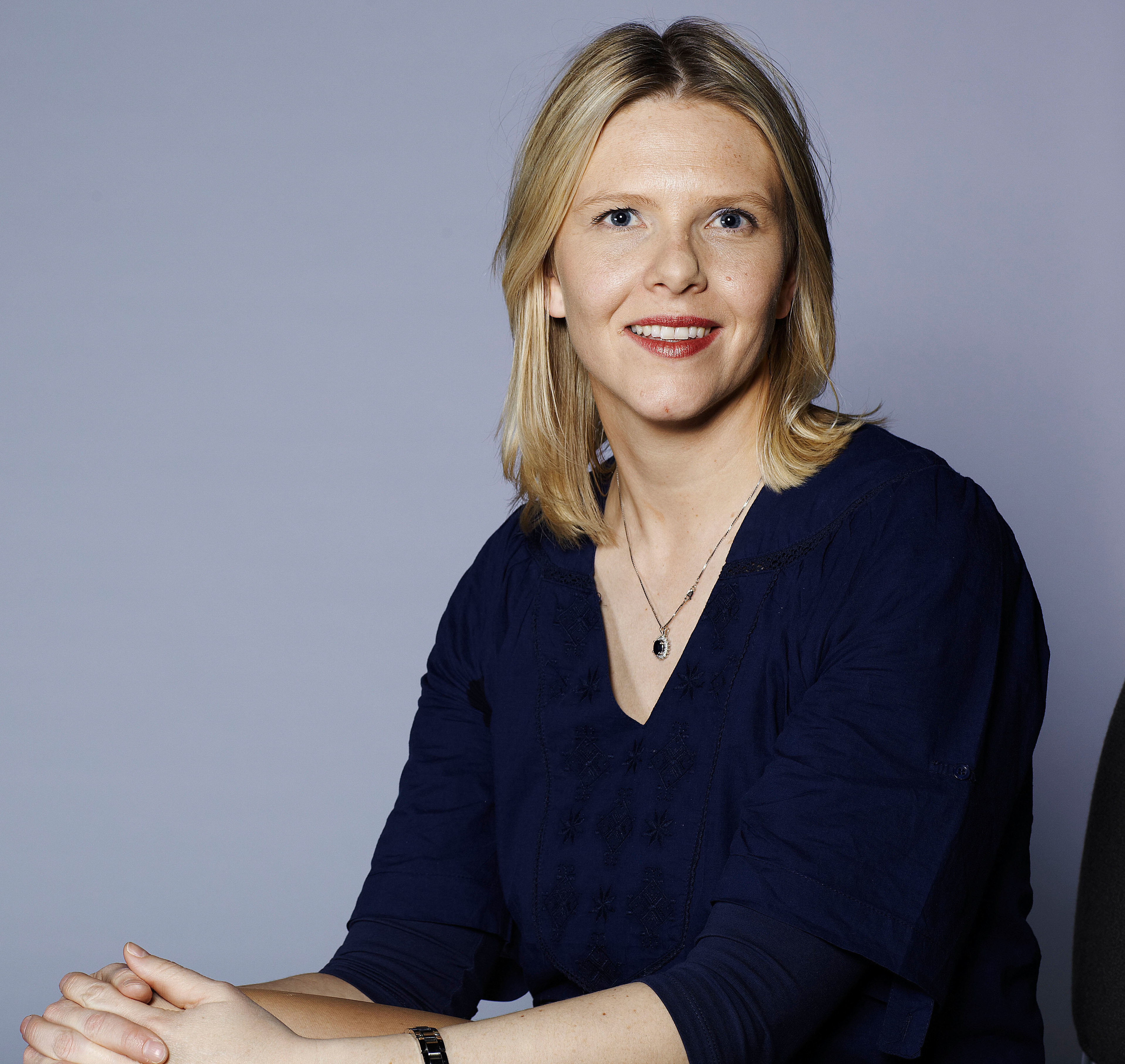 Sylvi Listhaug valgkampbilde for Stortingsvalgkampen 2009